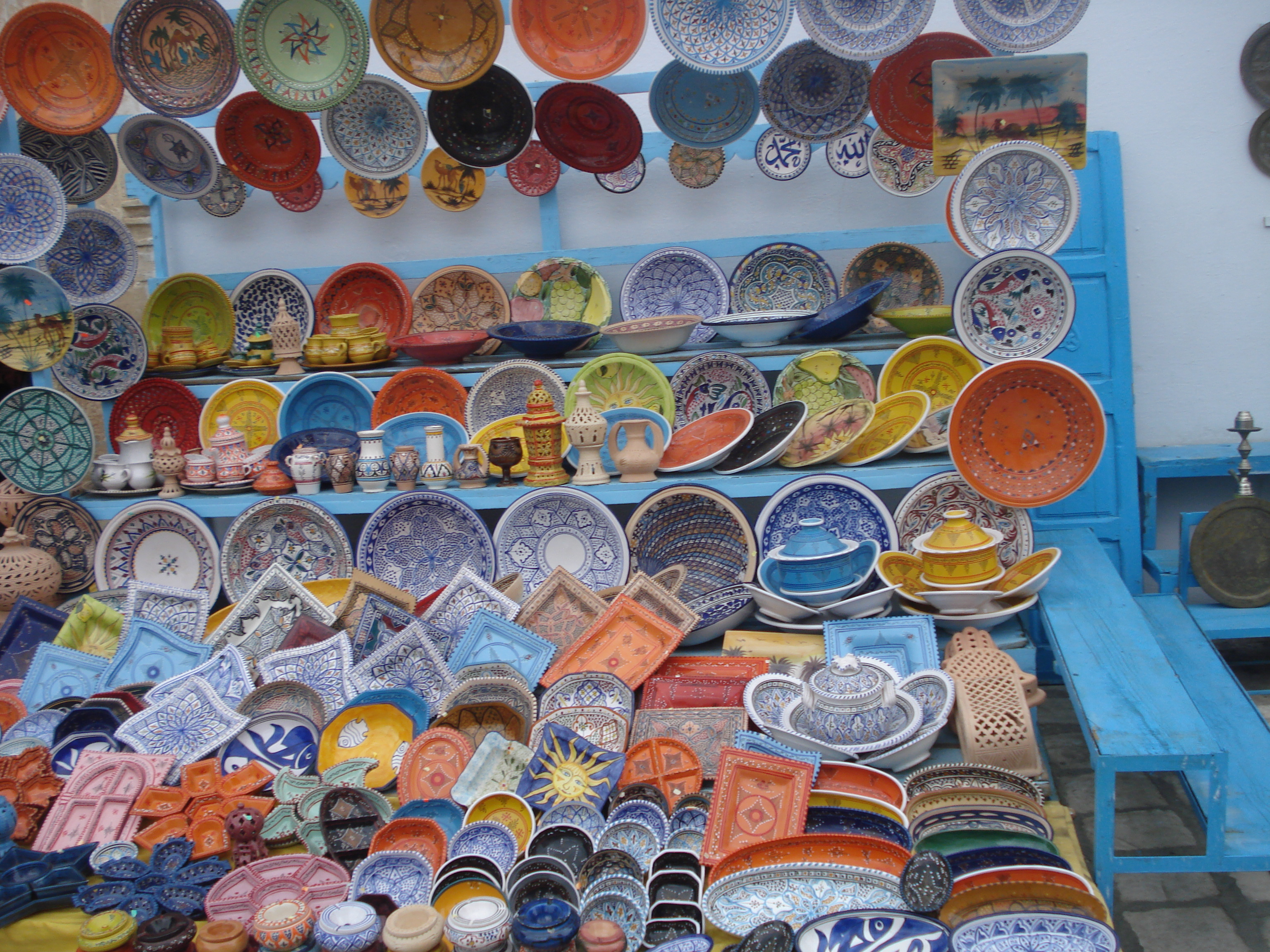 Assiettes décorées dans la médina de Kairouan (Tunisie)